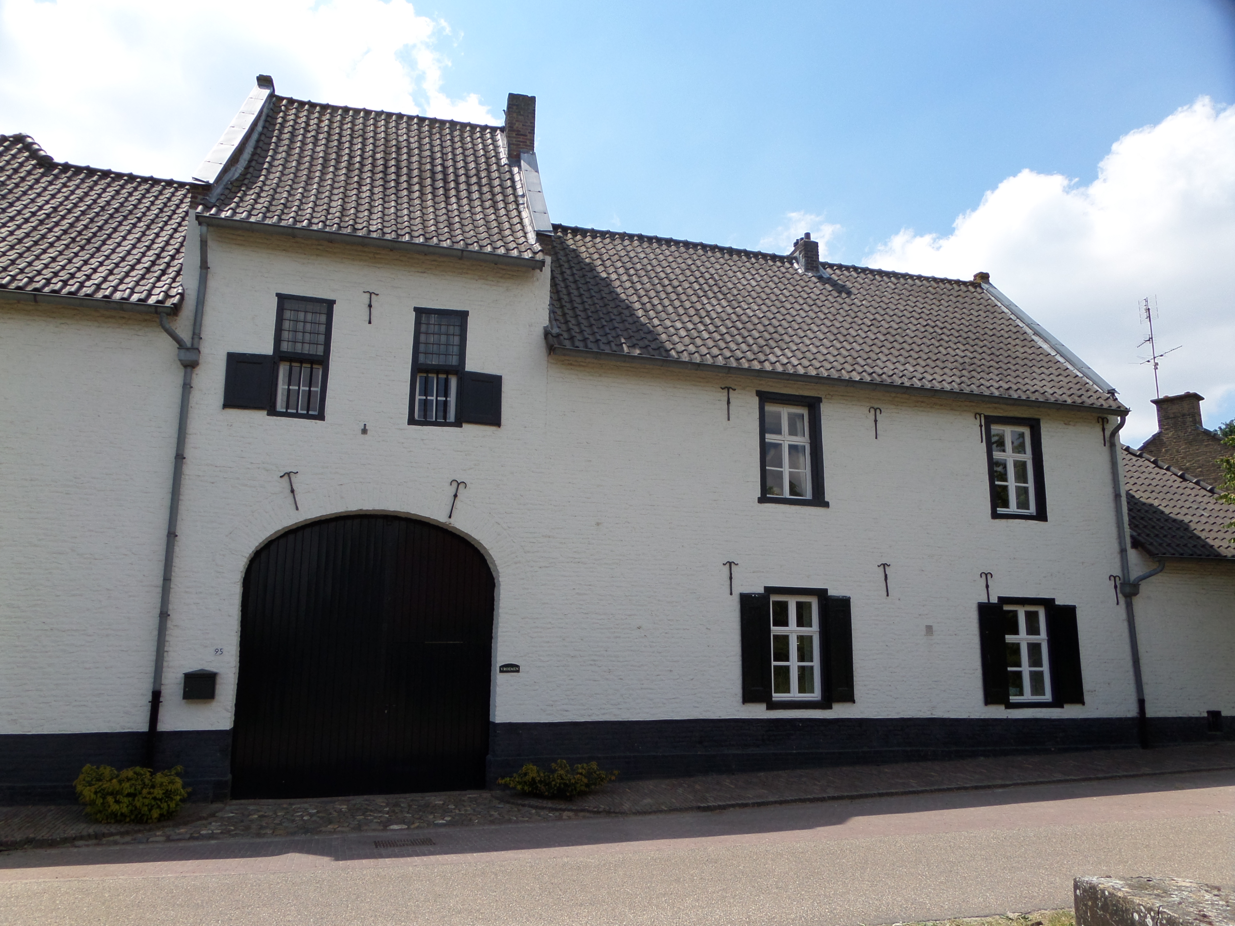 Nederlands